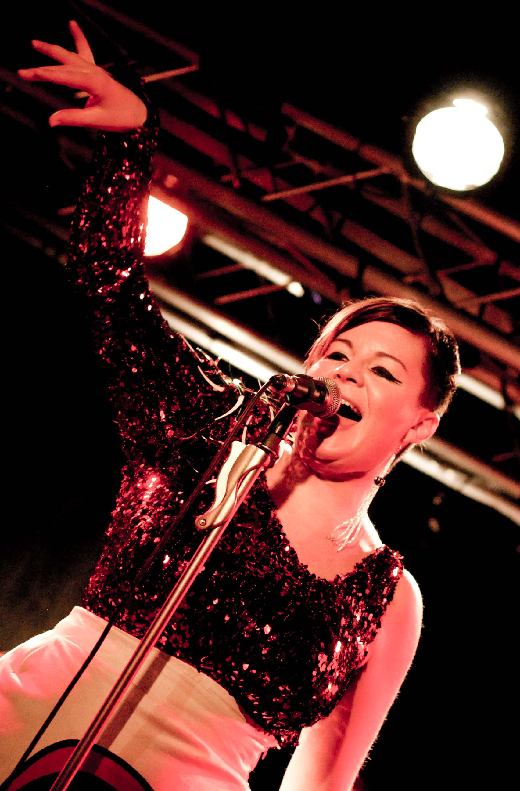 Miss Platnum bei einem Konzert im "Boule Noire".